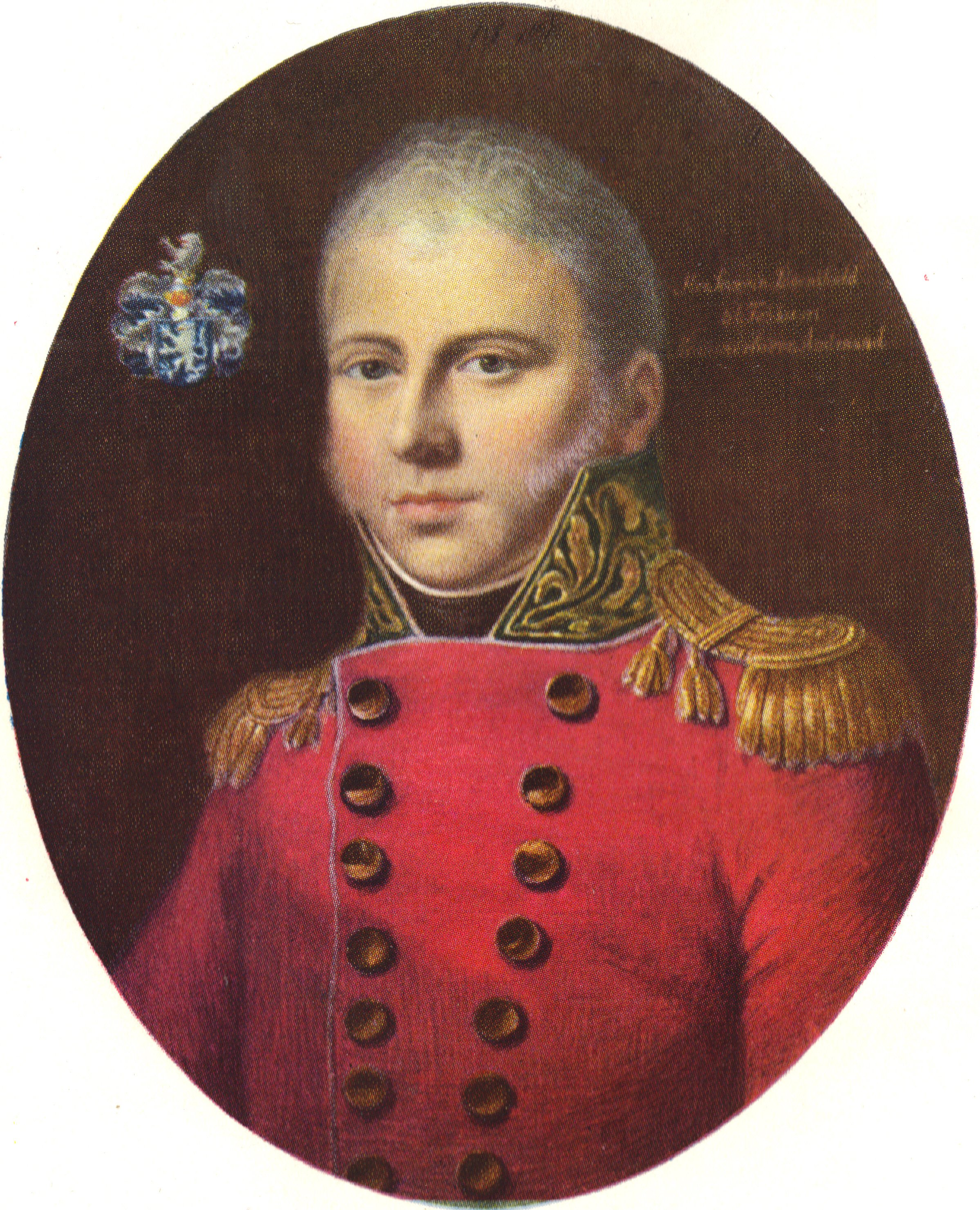 Norsk (bokmål): Severin Løvenskiold